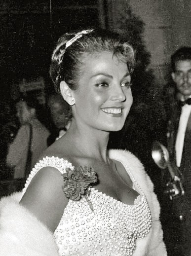 La actriz española Carmen Sevilla en el Festival de San Sebastián de 1956